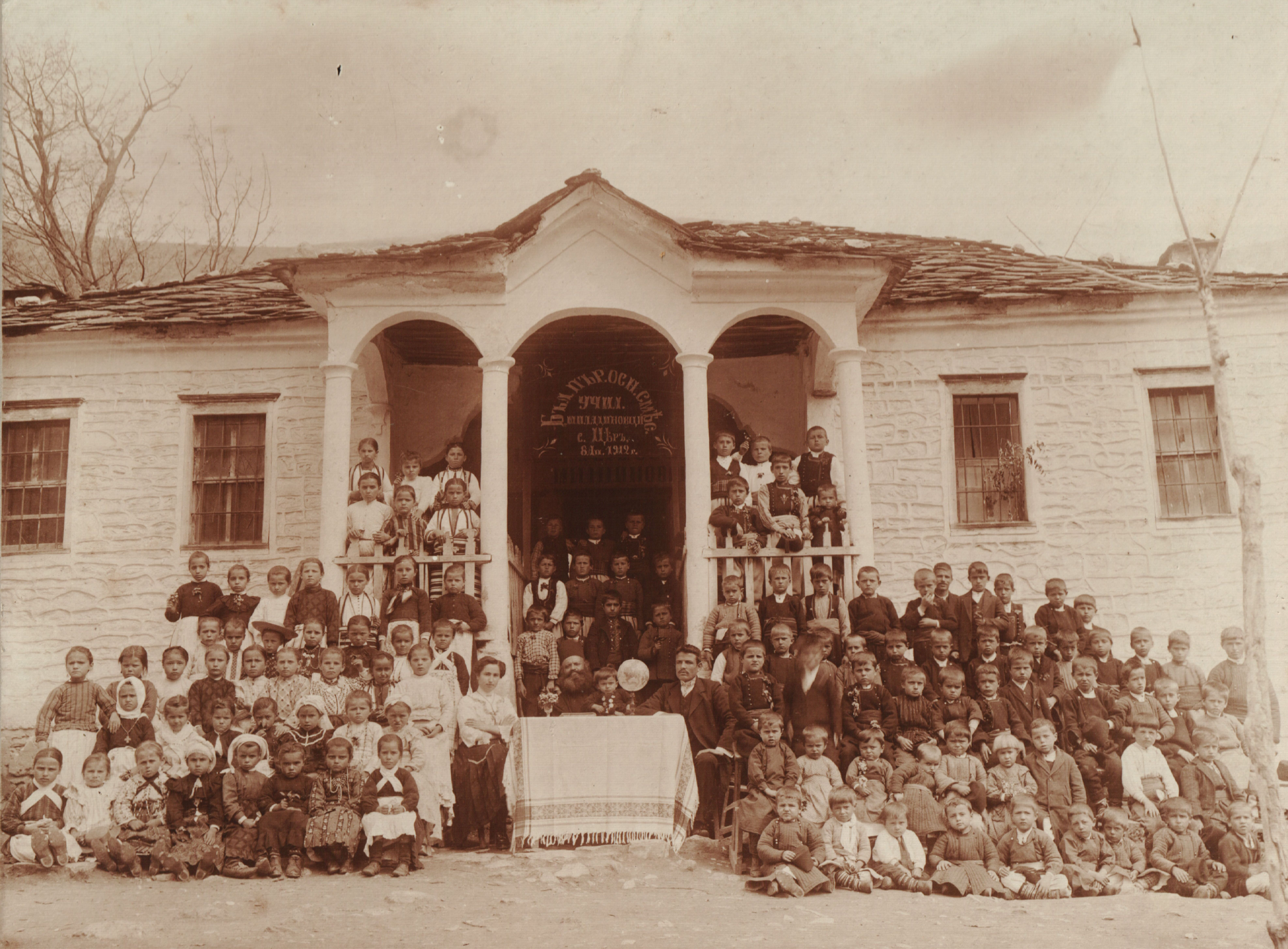 Снимка на училището в Цер.